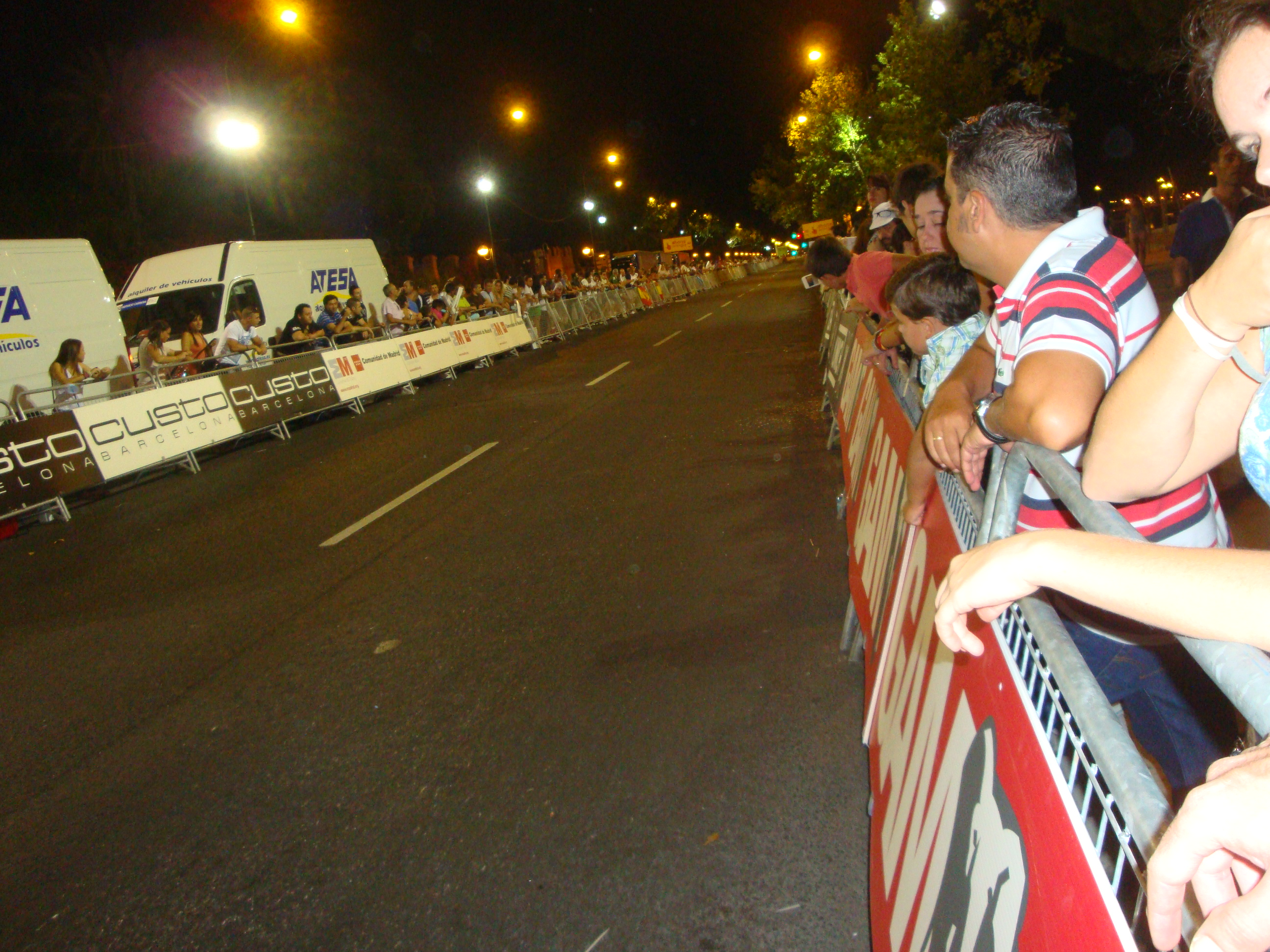 Circuito Urbano nocturno etapa contra reloj por equipos Sevilla 2010